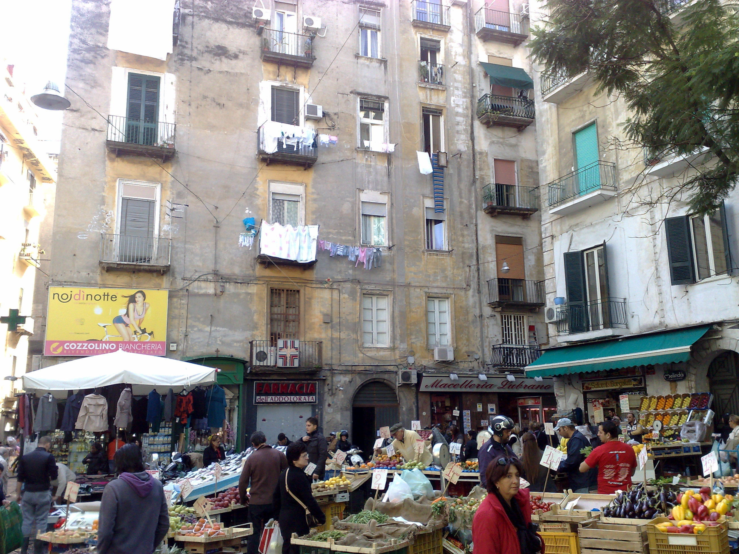 Mercatino nella Pignasecca (Napoli)